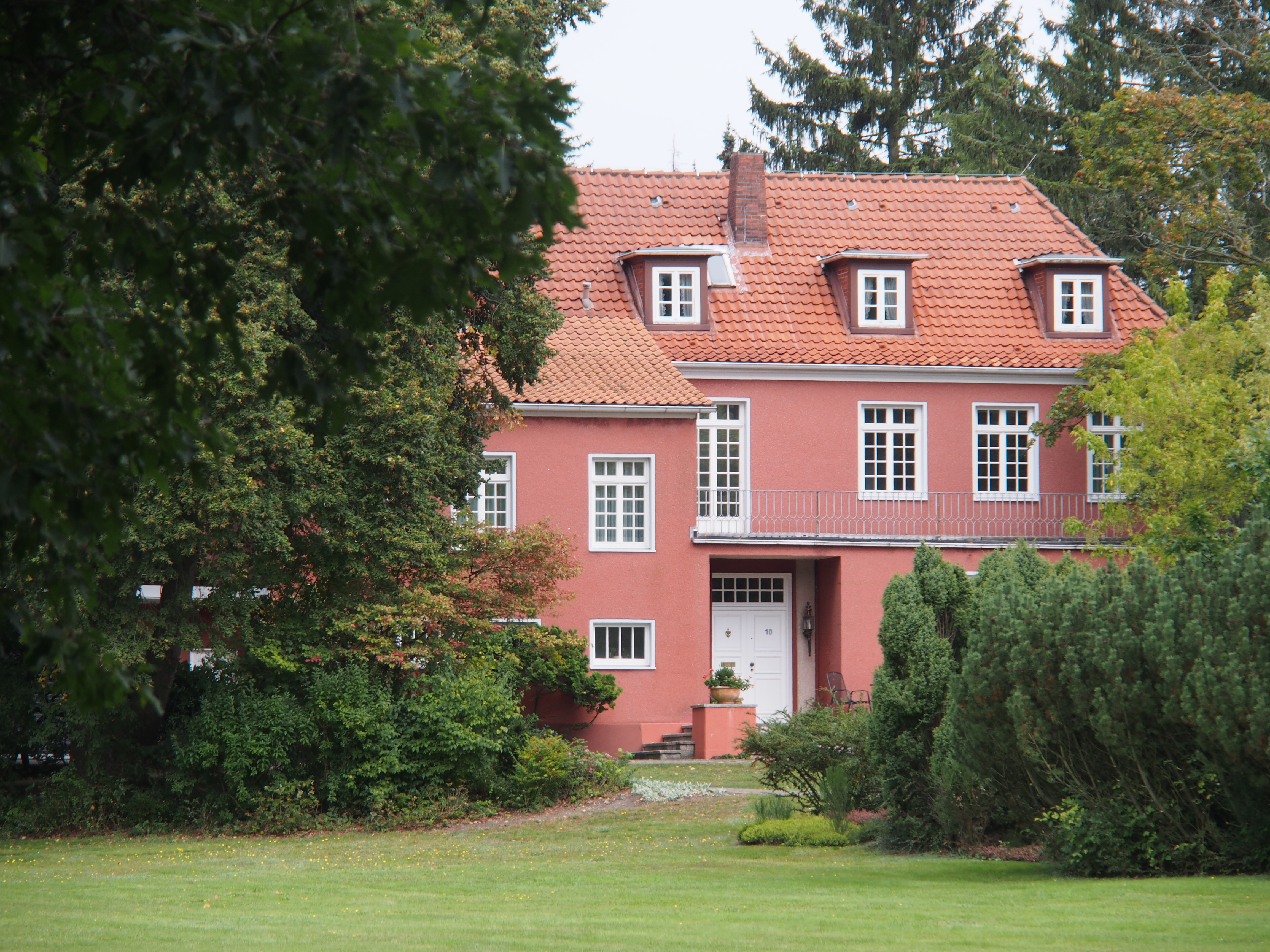 Herrenhaus in Burghorn, Gemeinde Eschede, Ortsteil Habighorst, Niedersachsen. In diesem Haus starb am 8. November 1945 Generalfeldmarschall August von Mackensen.